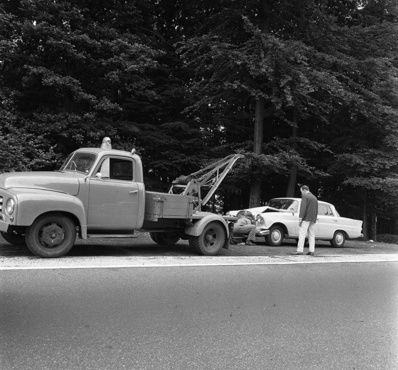 Afrikanische Botschafter reisen durch Süd-Deutschland Unfälle auf der Autobahn im Westerwald